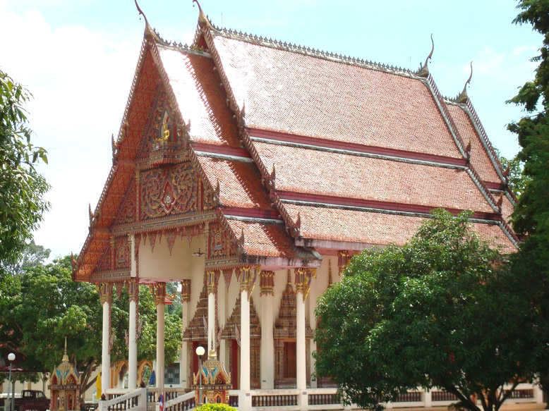 พระอุโบสถ วัดคีรีวัน จ.นครนายก